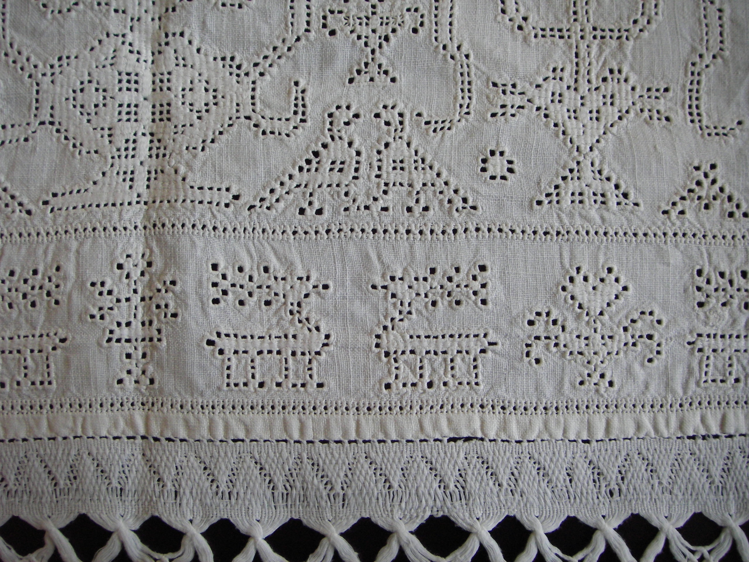 Hedebosyning fra perioden ca. 1805 - 1840